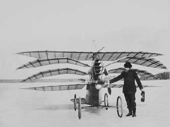 C. R. Nyberg with Flugan at Askrikefjärden